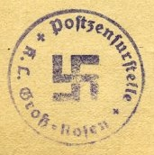 Stempel d. Postzenszurstelle d. KZ Groß-Rosen von 1943